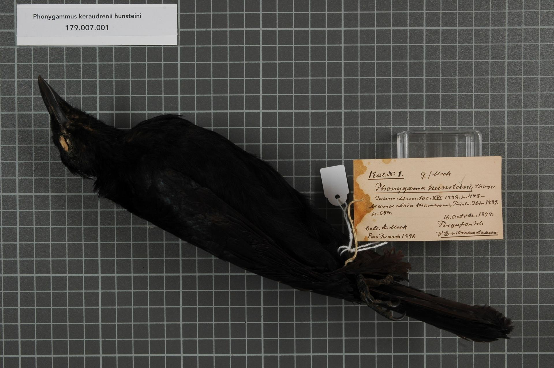 Phonygammus keraudrenii hunsteini Sharpe, 1882